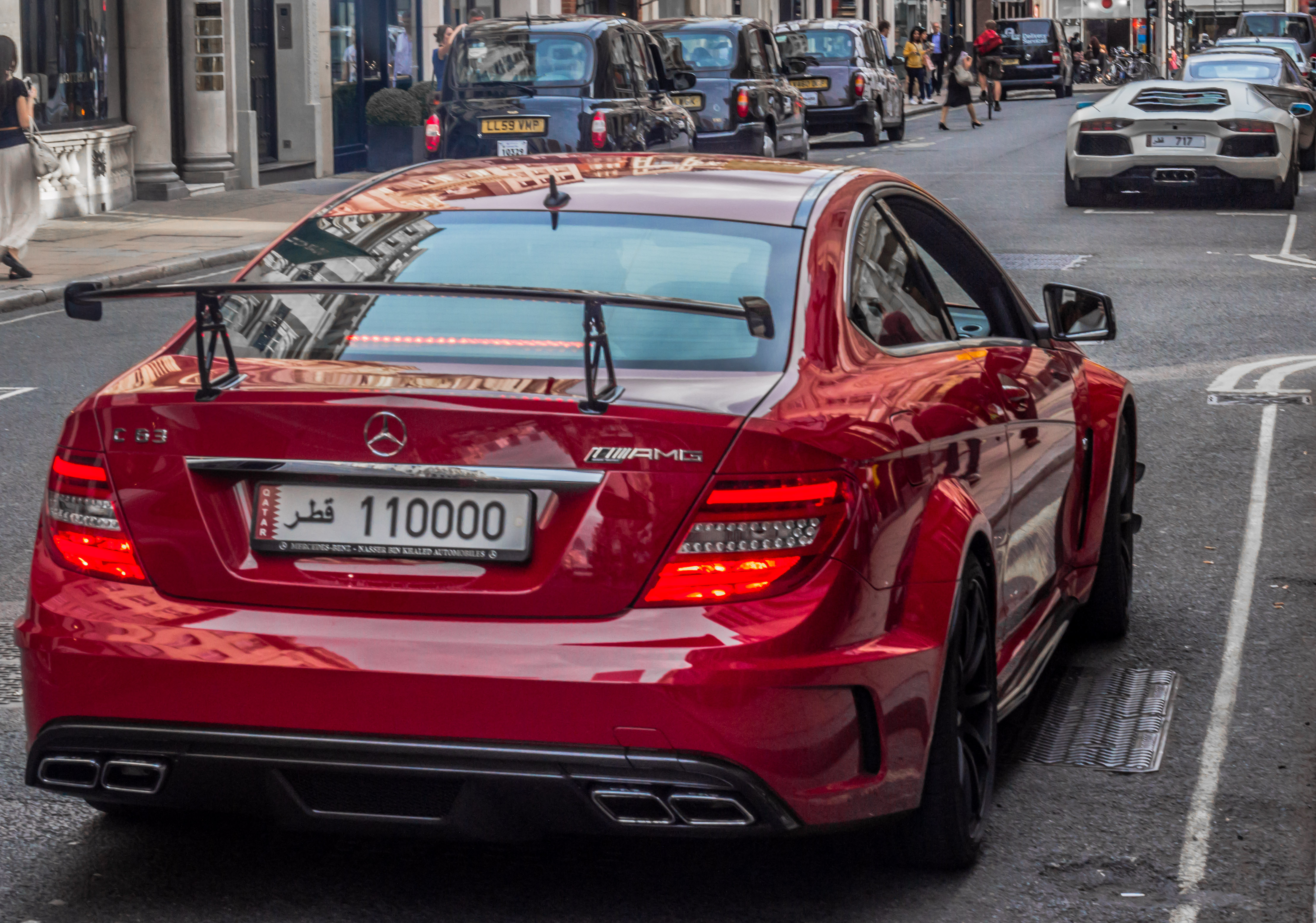 Arabic combo